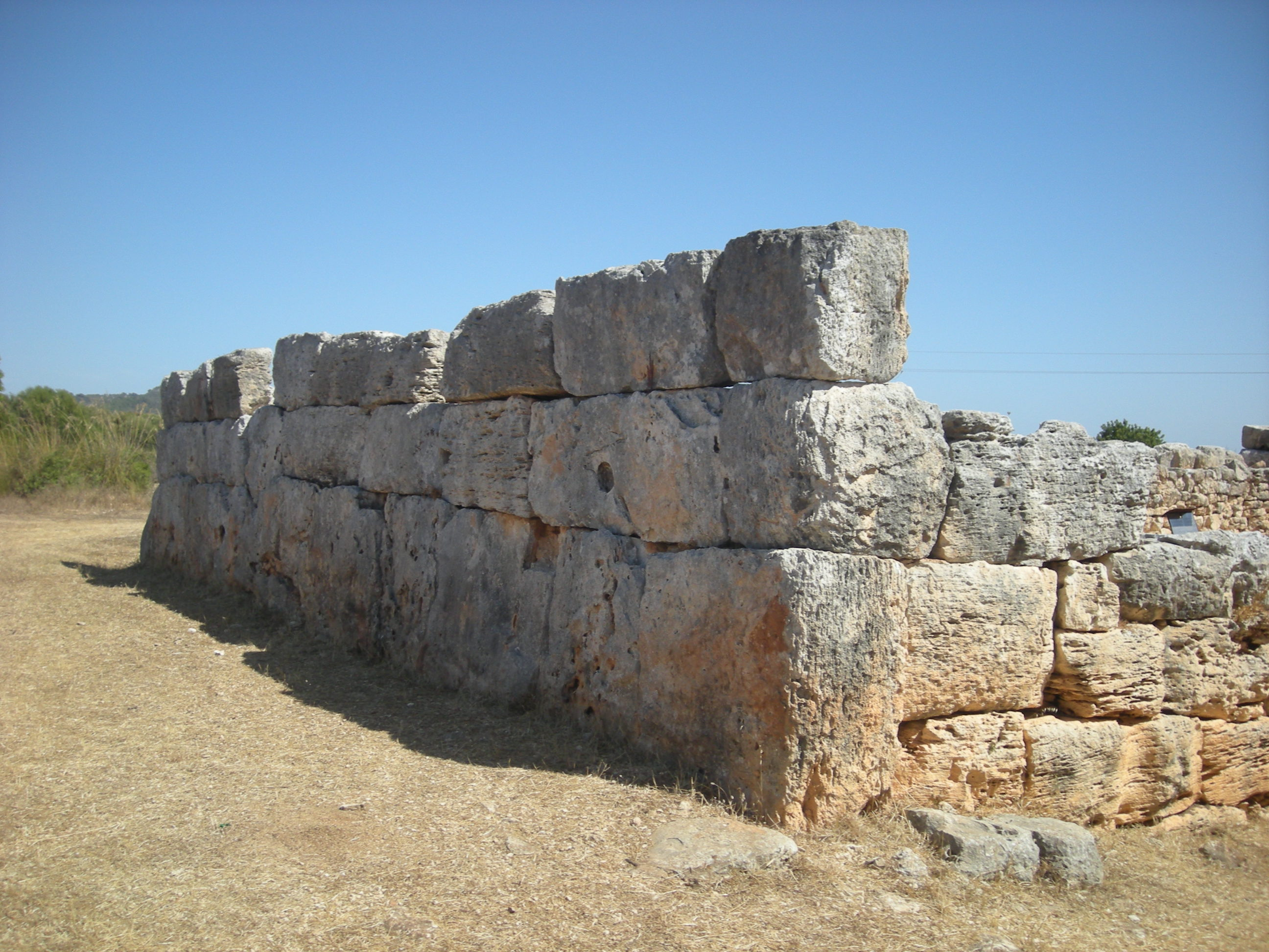 Poblat talaiòtic de l'Hospitalet Vell. Manacor, Mallorca.